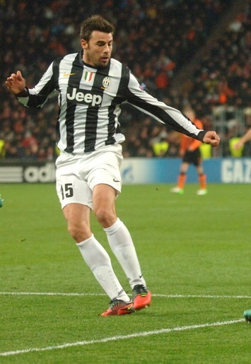 Andrea Barzagli Difensore della Juventus